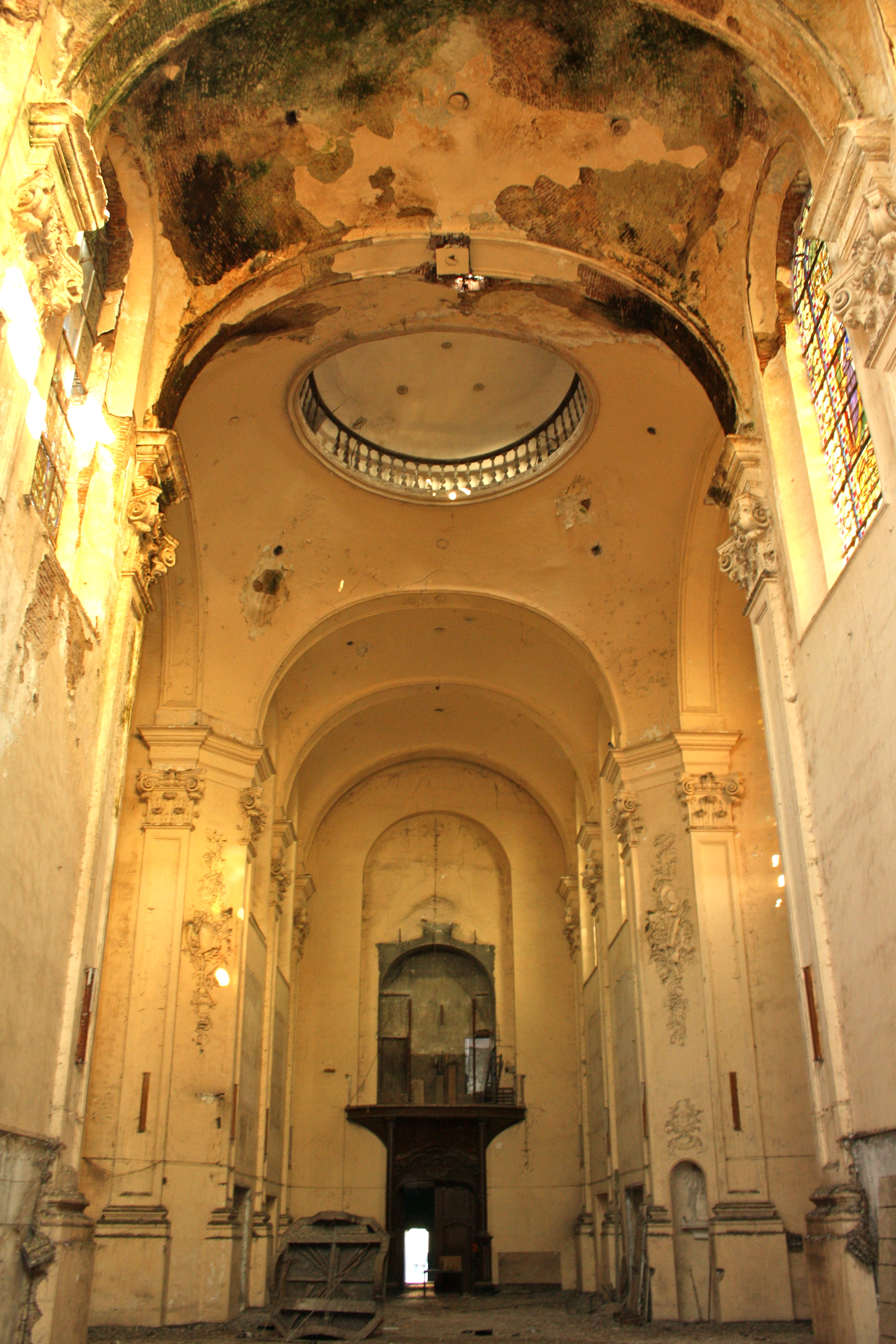 vue vers la nef